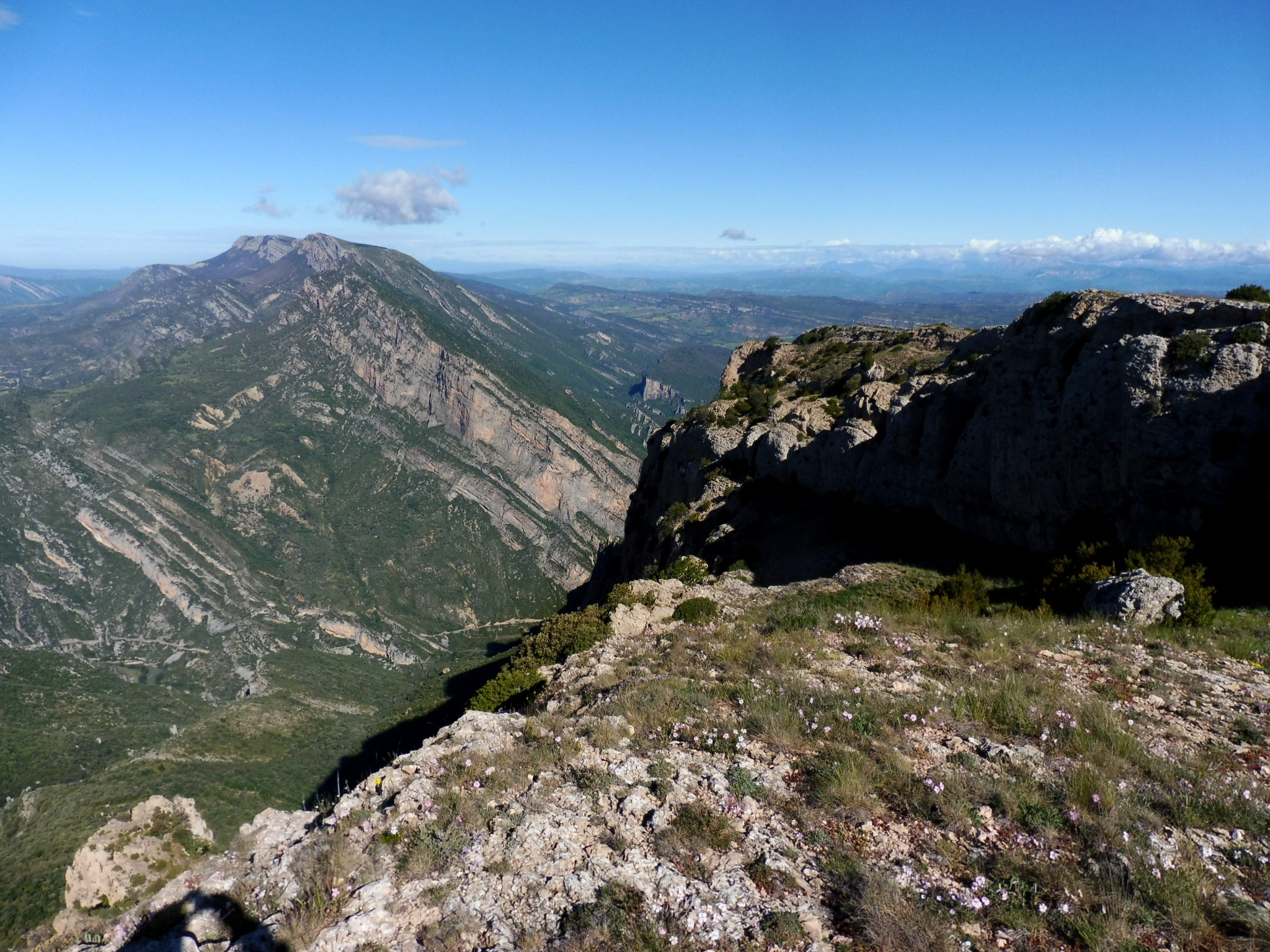 El Serrat de Fontfreda ( Montsec d'Ares) des de la carena del Peladet, al Montsec de Rúbies This is a a photo of a natural area in Catalonia, Spain, with id: ES510192